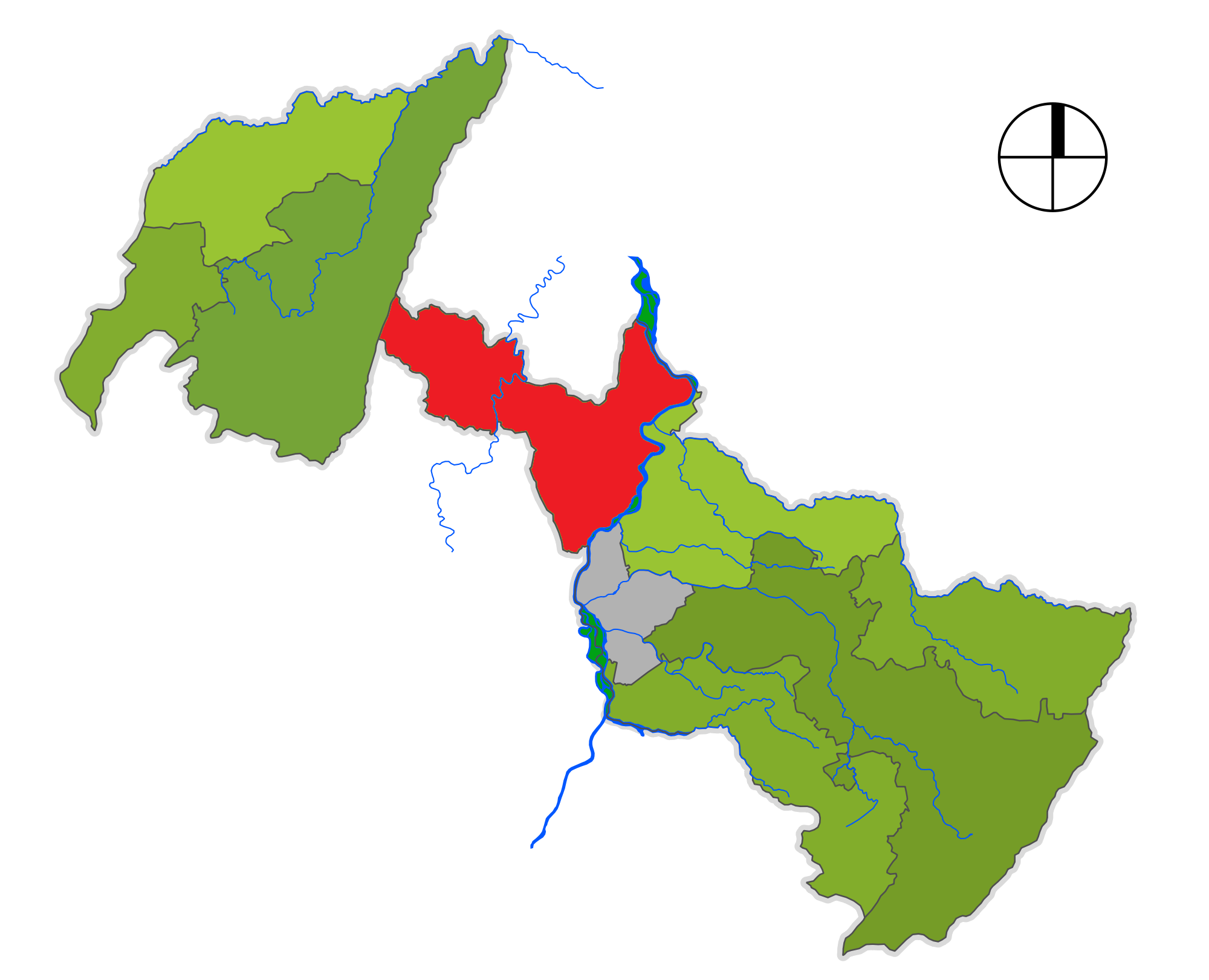 Corregimiento de Neiva Guacirco, departamento del Huila, Colombia.